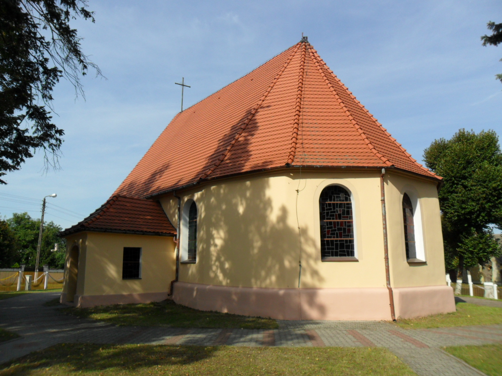 Kościół w Chlebowie